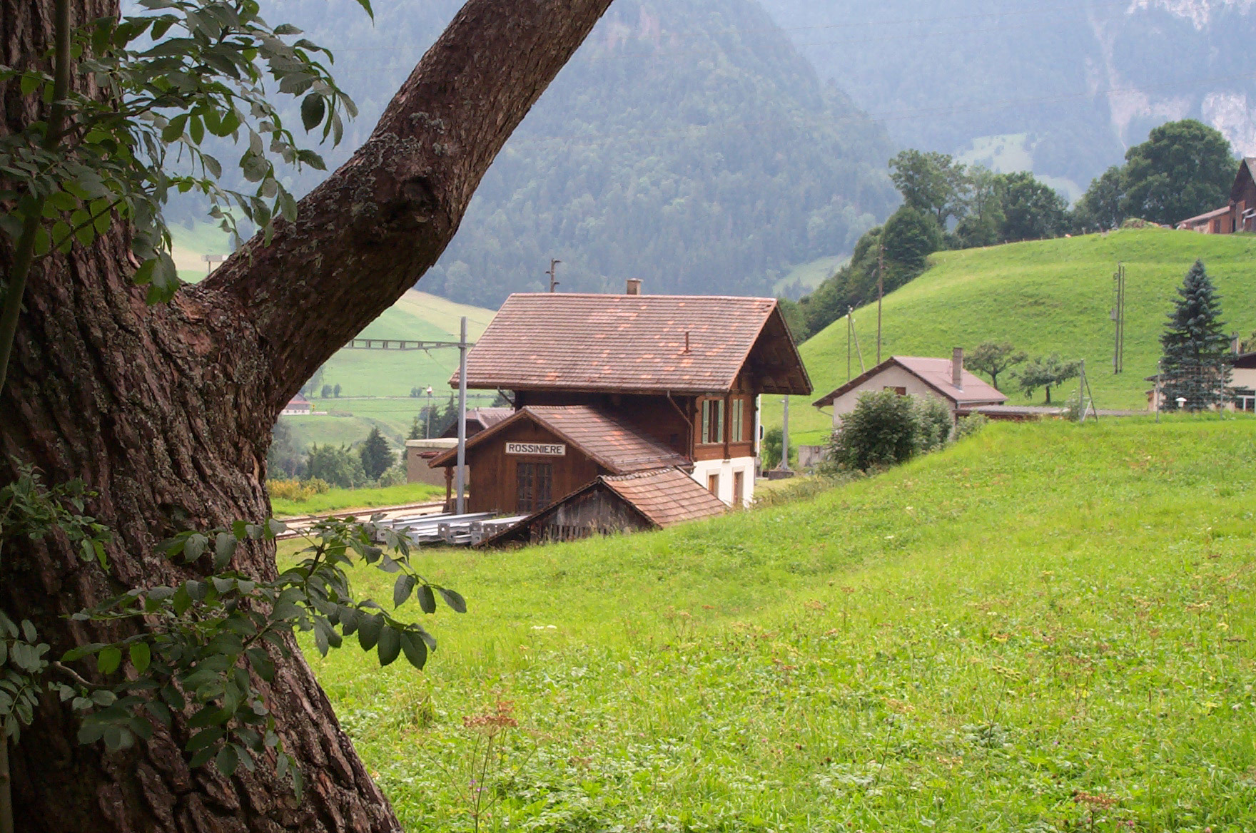 Chalet de Rossinière : halte ferroviaire desservant le chalet